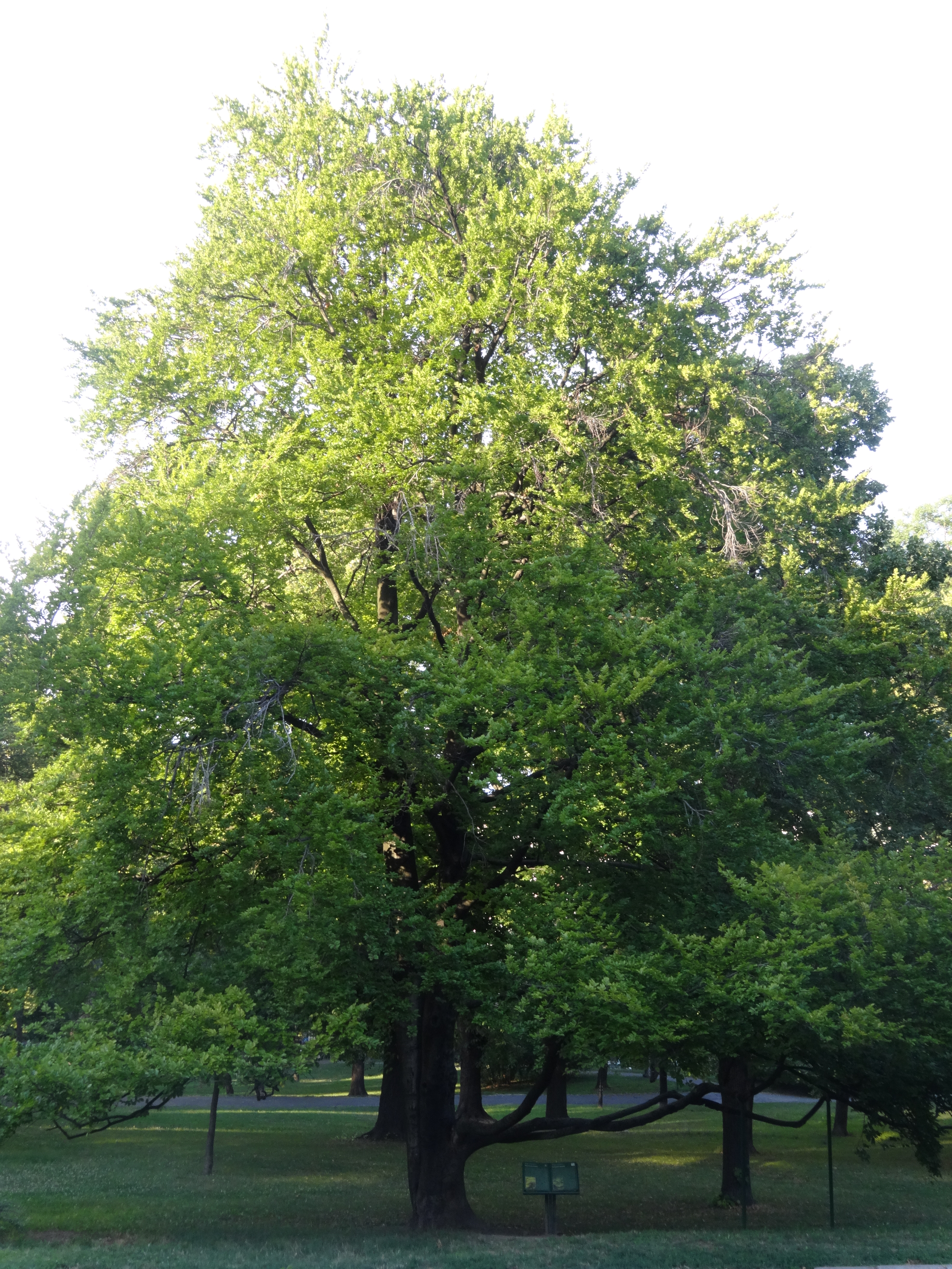 Природни споменик Европска буква на Калемегдану Ово је фотографија заштићеног природног добра у Србији под шифром: СП013 This is a a photo of a natural area in Serbia with ID: СП013